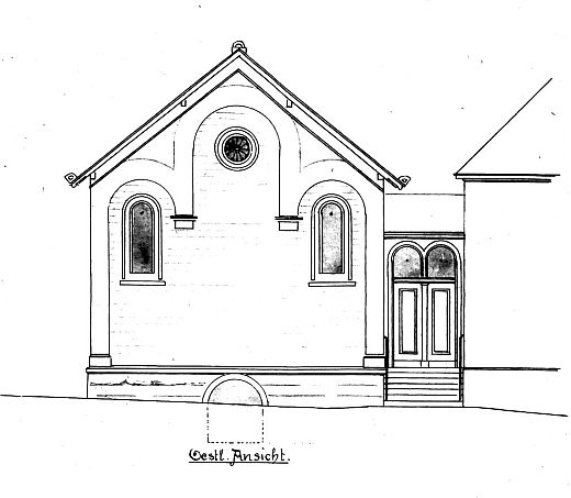 Pläne der ehemaligen Synagoge Königheim im Main-Tauber-Kreis (Baden-Württemberg)